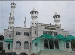 Mesjid Besar Al Ikhlash